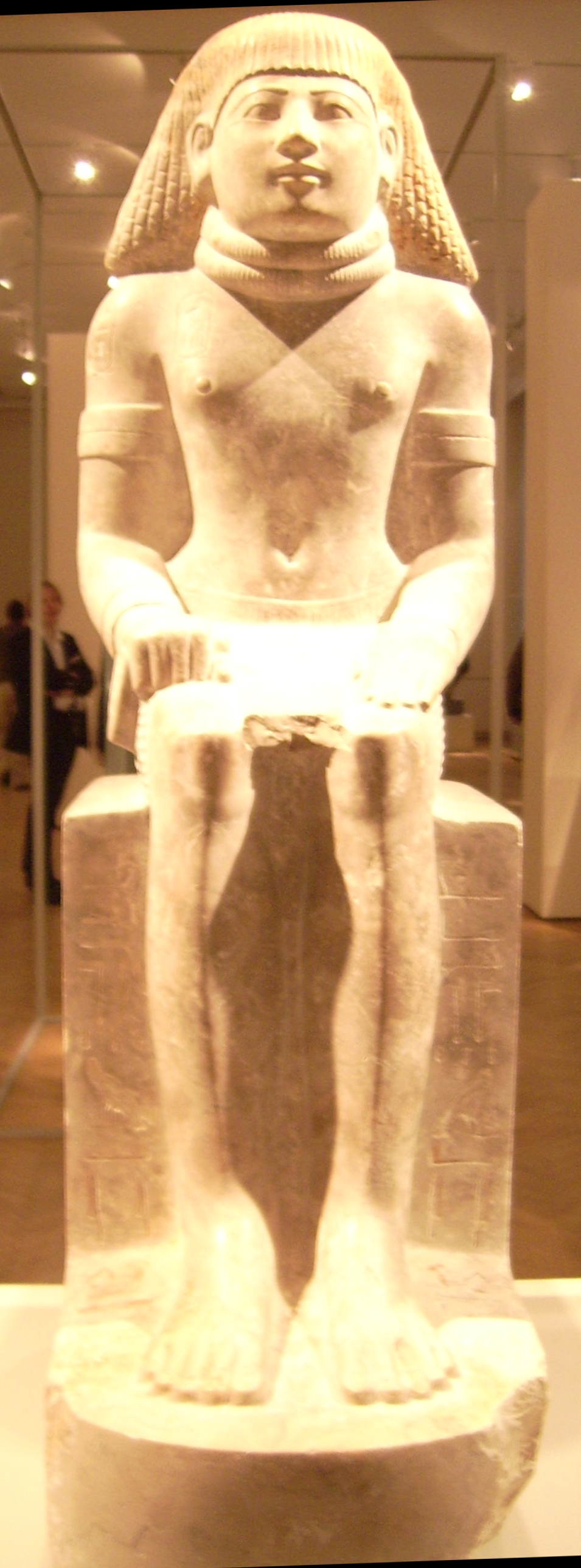 Sitzfigur des Maja; Neues Reich, 18. Dynastie, um 1450 v. Chr.; Kalkstein; Fundort Menschije?; Ägyptisches Museum/Altes Museum, Inv.-Nr. 19286